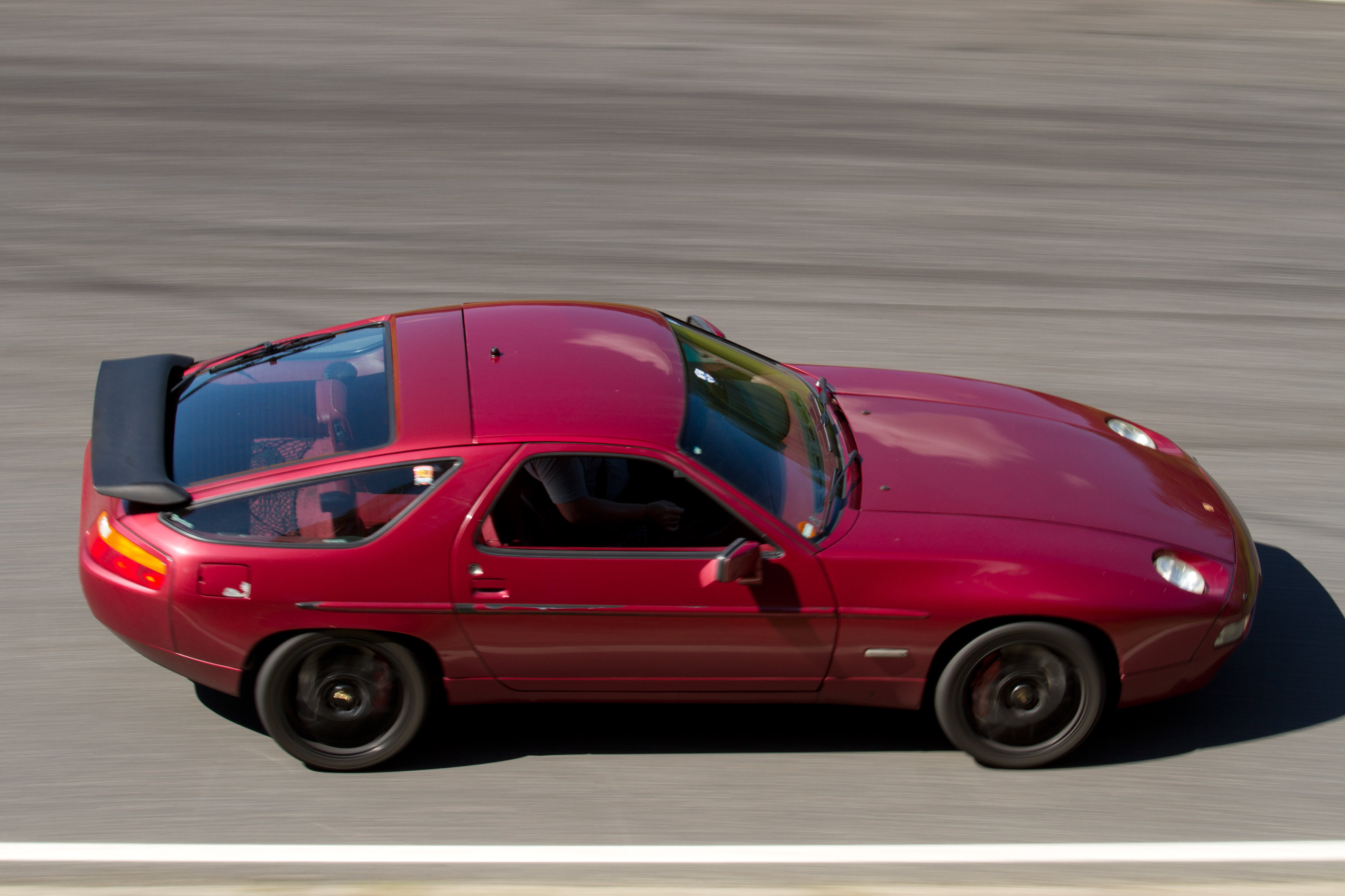 PCF Ahvenisto 2013